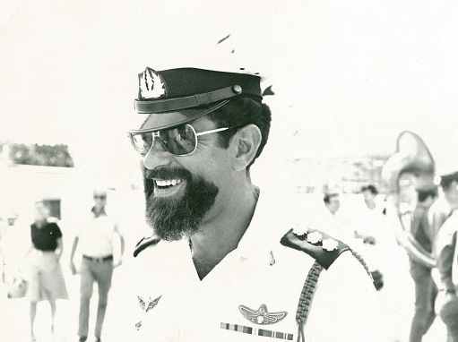 אל"מ שאול סלע מפקד בה"ד חיל הים